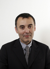 Franco Ceccuzzi, politico italiano